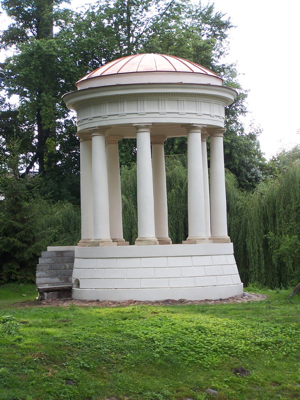 Dobrzyca, ul. Pleszewska 5A - zespół pałacowy: monopter z końca XVIII w. (zabytek nr 4/A)